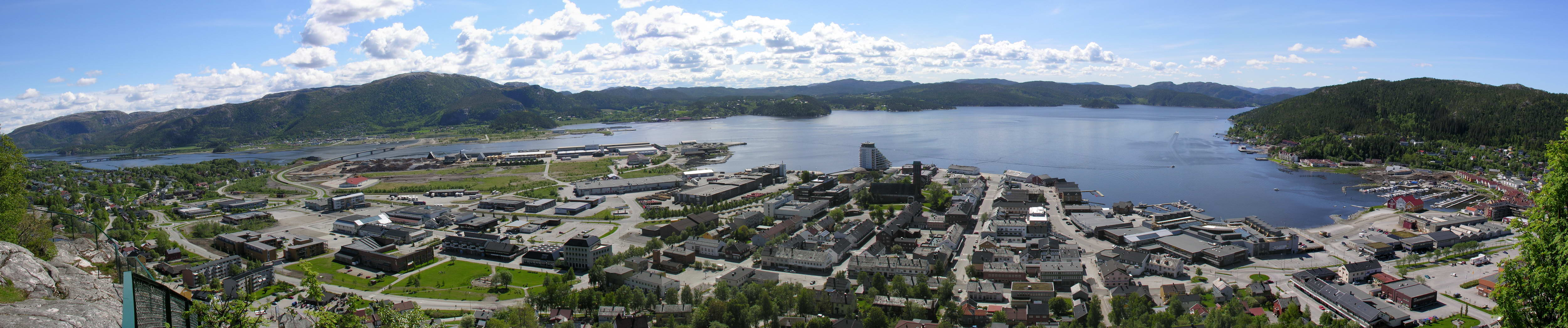 Panorama av Namsos Sentrum tatt fra byfjellet Klompen 28 mai 2006. Foto: Geir Tore Mjønes